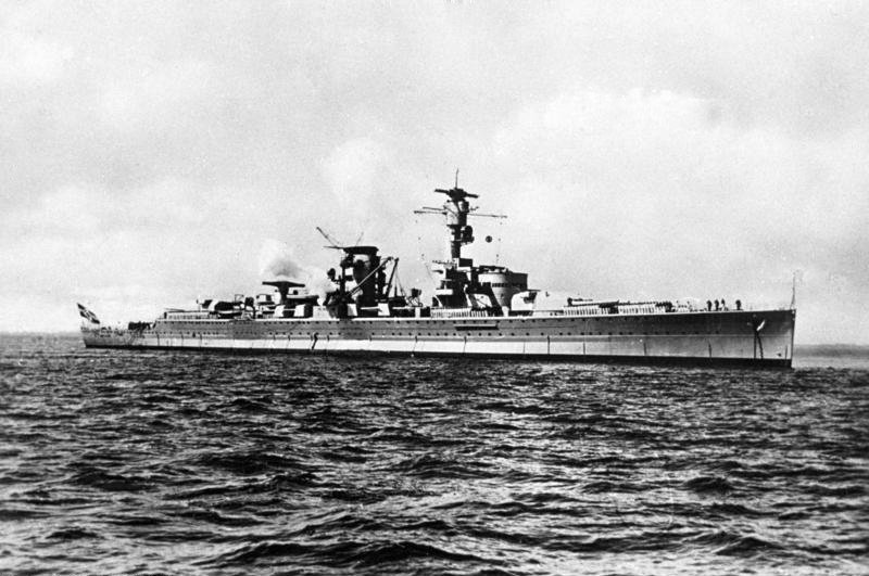 Panzerschiff "Deutschland" Panzerschiff "Deutschland". Evt. retuschierte Reichskriegsflagge